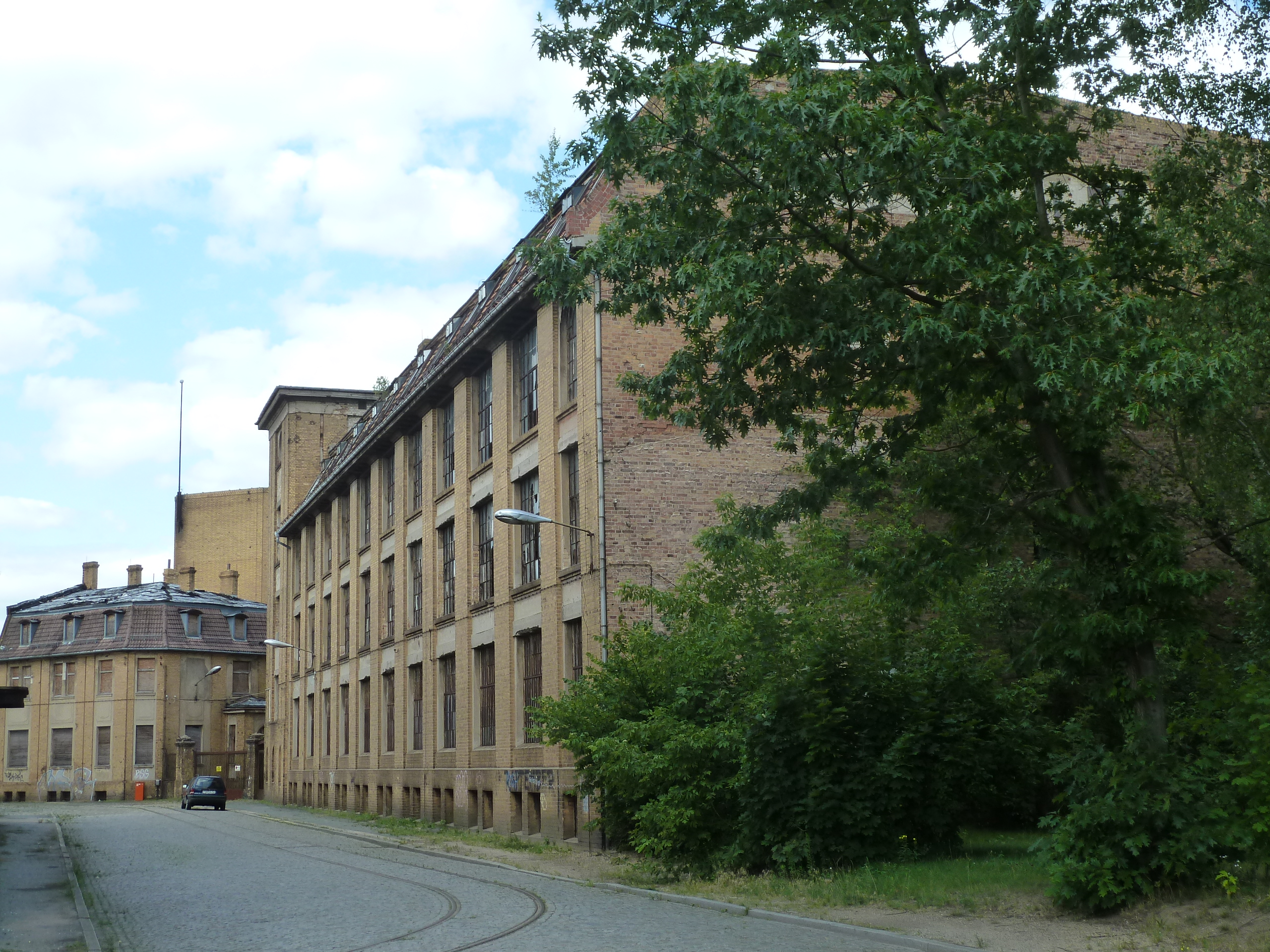 Früher Tuchfabrik Pürschel, Heinrich-Werner-Straße , Forst (Lausitz), Kulturdenkmal, Blick von Süden mit Gleisresten der Forster Stadteisenbahn